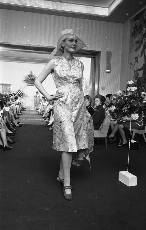 Modenschau in der Landesvertretung Baden-Württemberg.